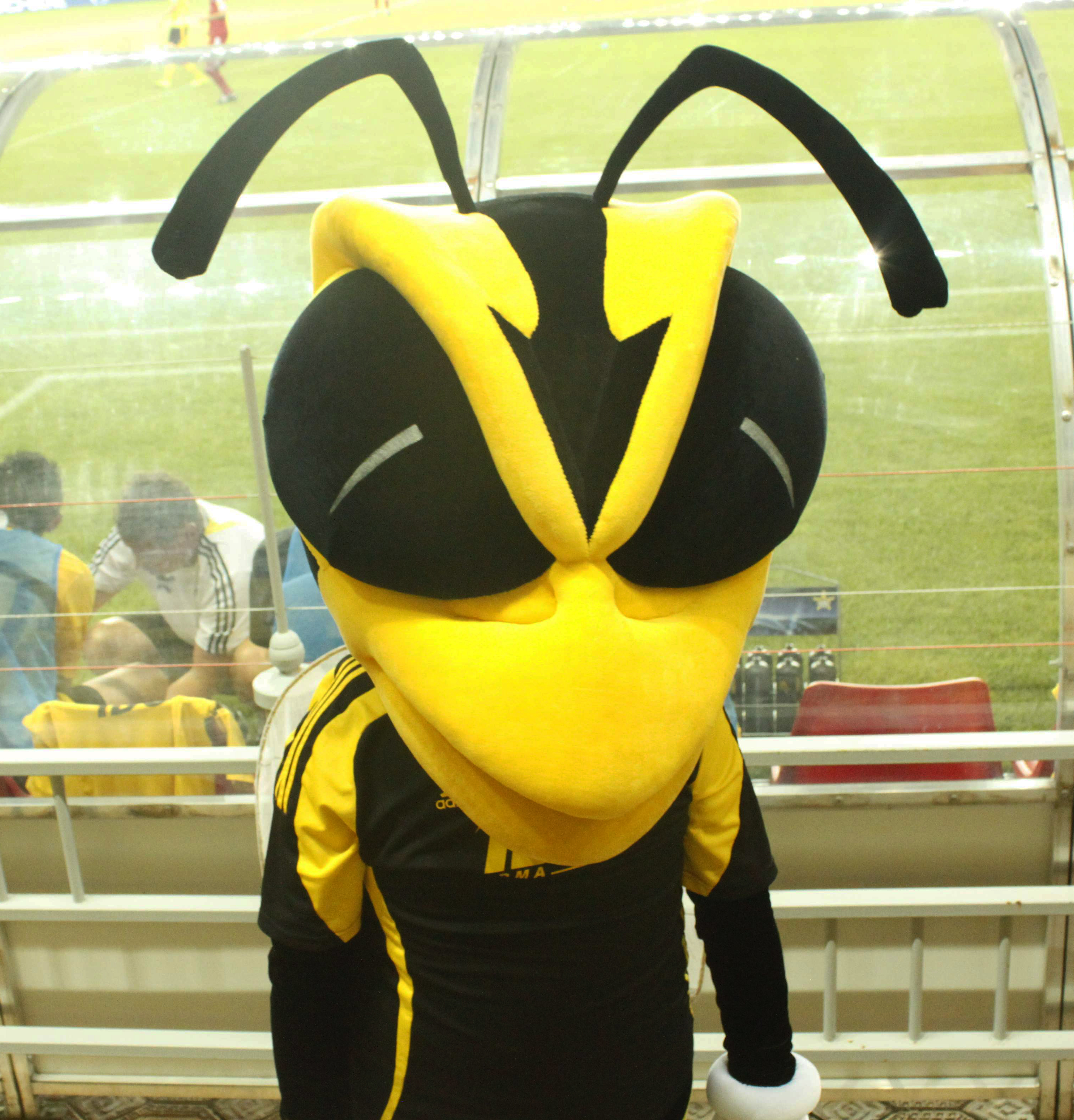 Оса - символ ФК Шериф